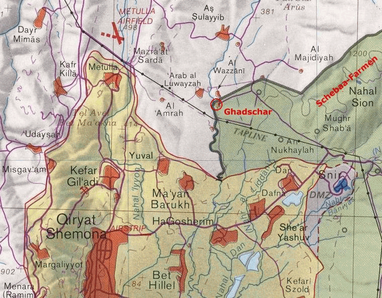 Lage des Grenzortes Ghadschar an der Blauen Linie zwischen Libanon und den von israel annektierten Golanhöhen